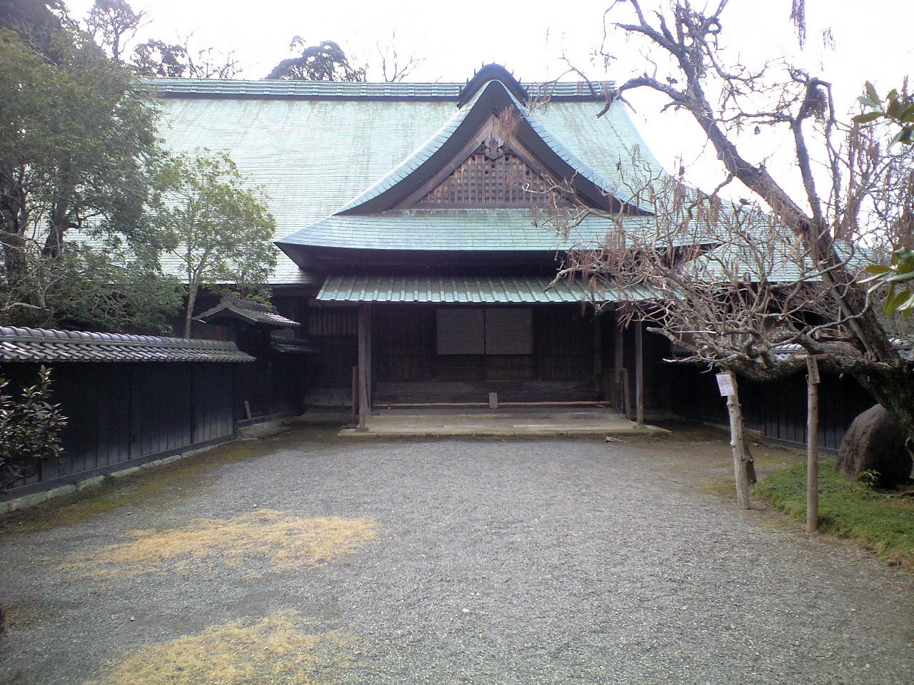 静岡県伊豆の国市韮山、「江川家住宅」主屋（1600年頃）（1958年（昭和33年）国重要文化財指定）